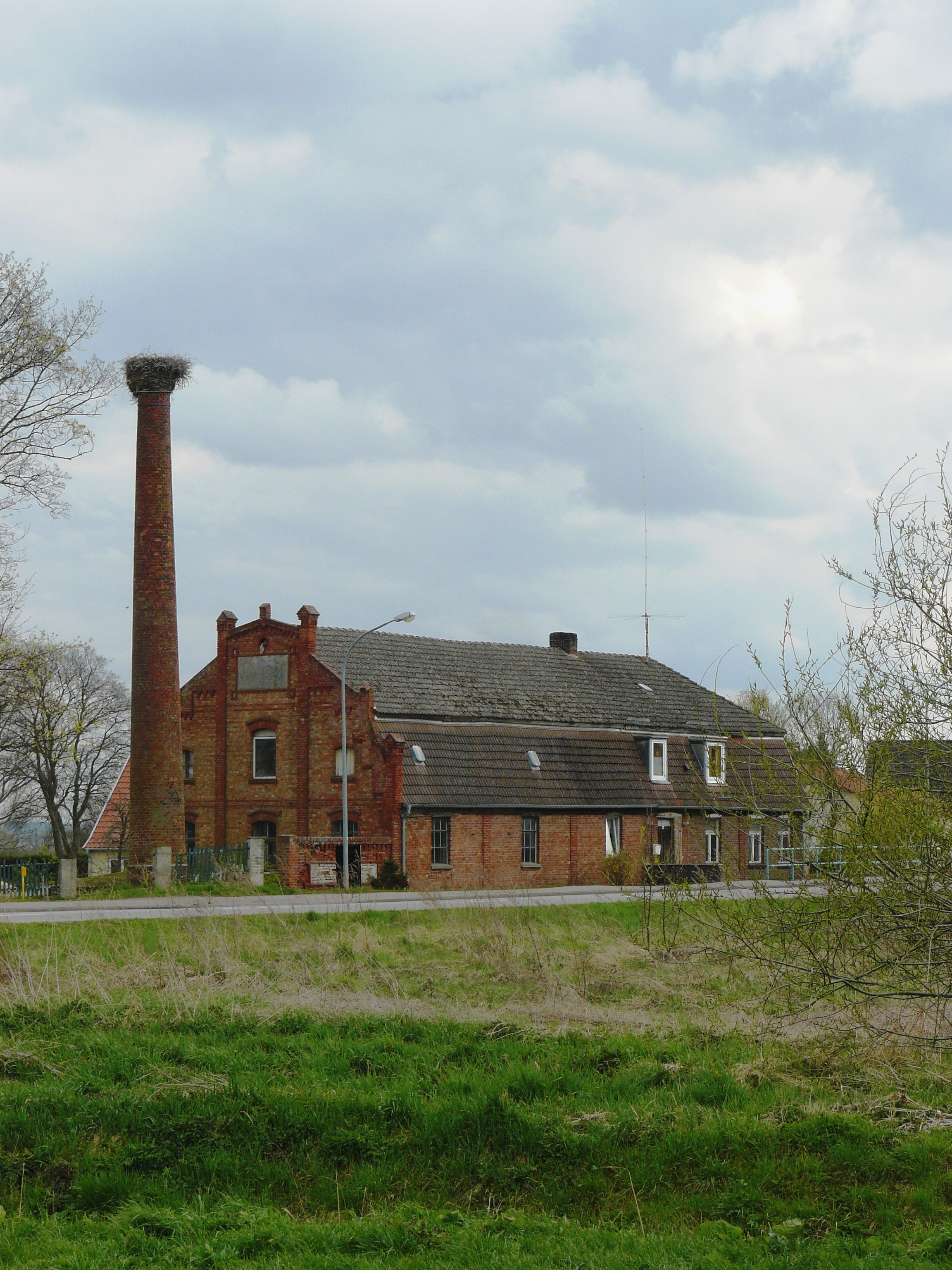 Alte Wassermühle Belling mit Storchenhorst